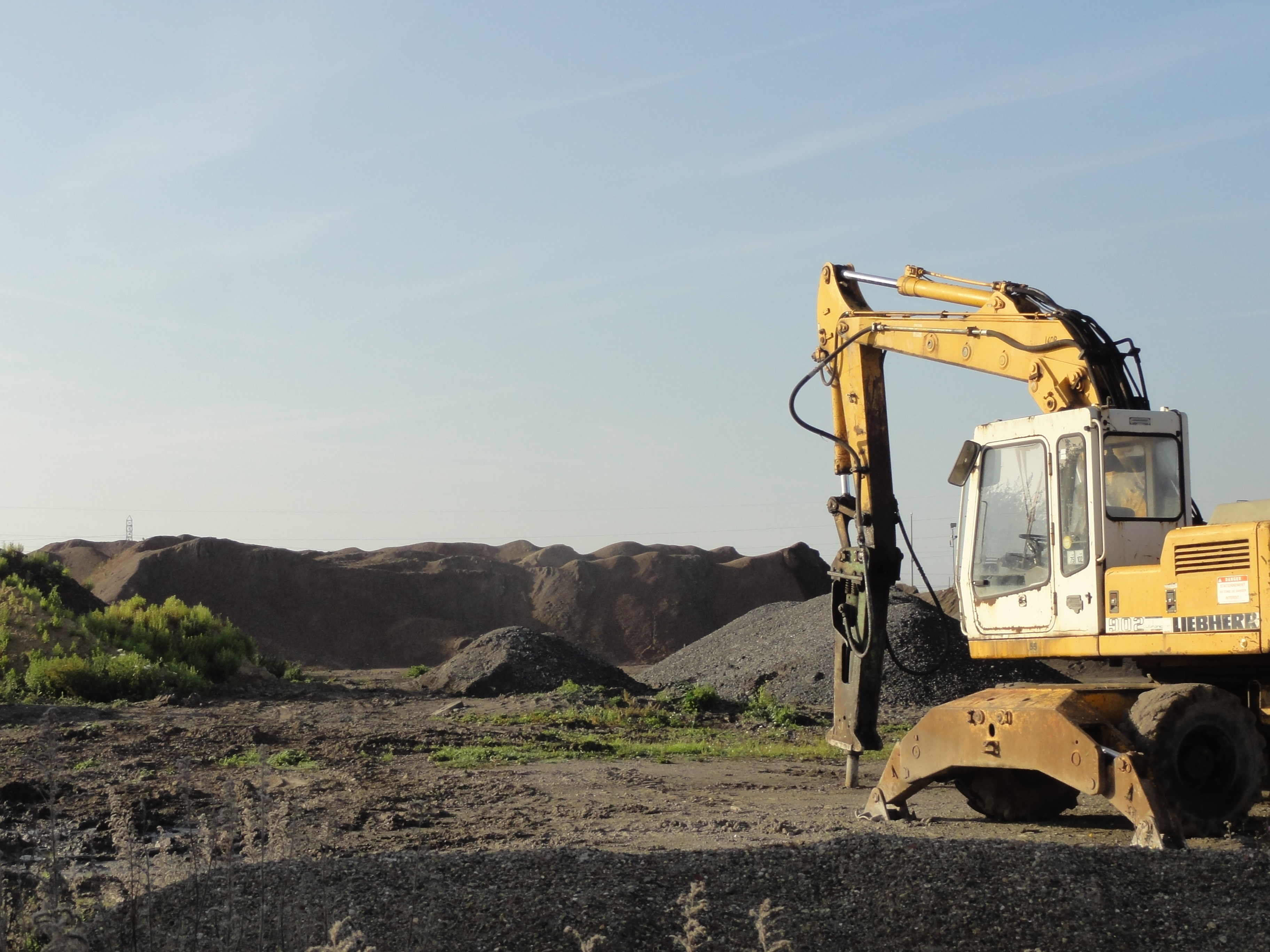 Terril n° 77 dit 8 de Béthune, fosse n° 8 - 8 bis de la Compagnie des mines de Béthune dans le bassin minier du Nord-Pas-de-Calais, Auchy-les-Mines, Pas-de-Calais, Nord-Pas-de-Calais, France.